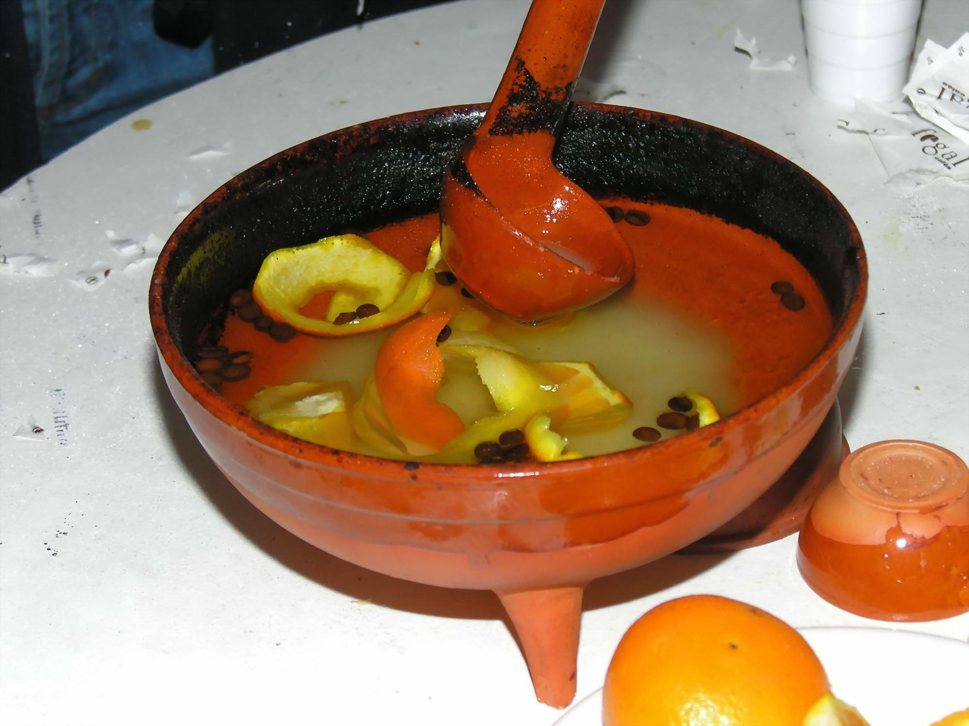 Queimafda. Galicia